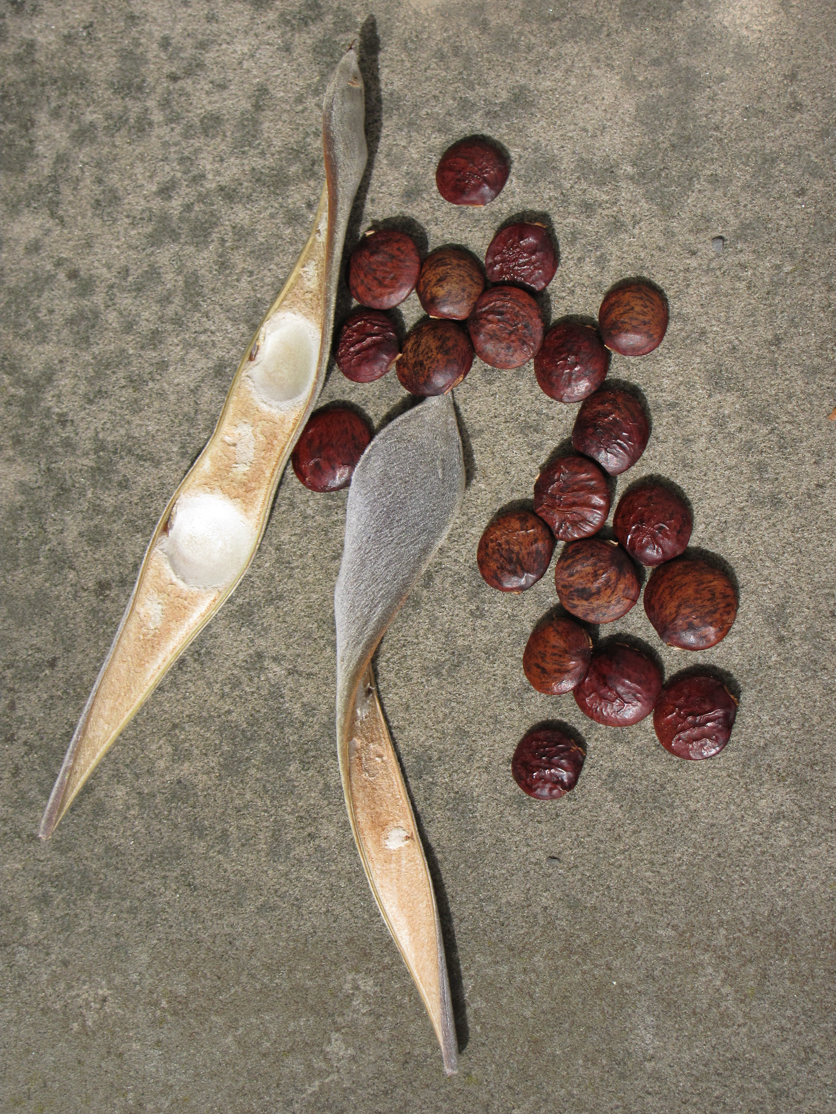 Blauregen: Samen und aufgeplatzte, trockene Hülsenblätter